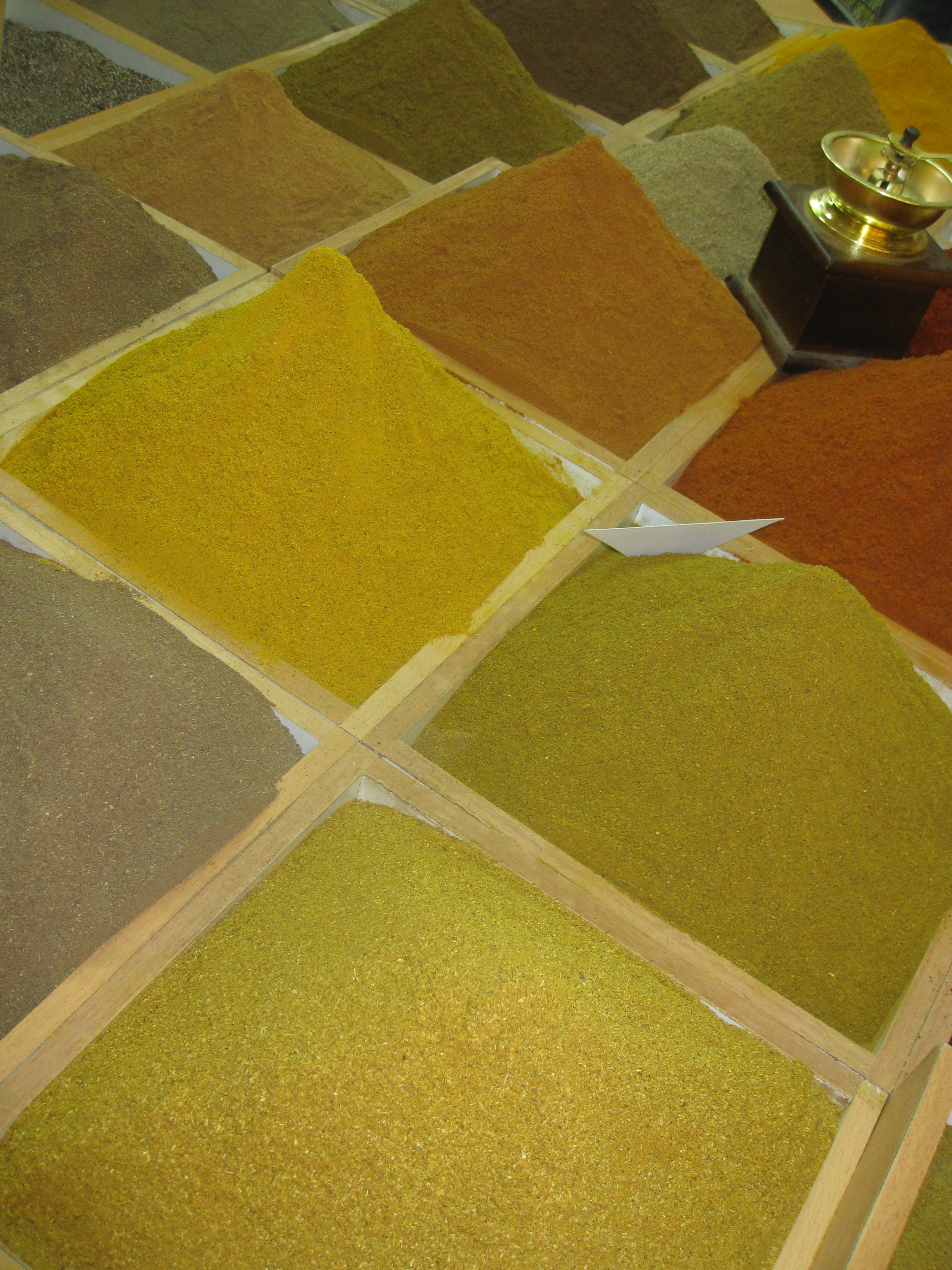 Old City of Jerusalem - the Market שווקי העיר העתיקה של ירושלים